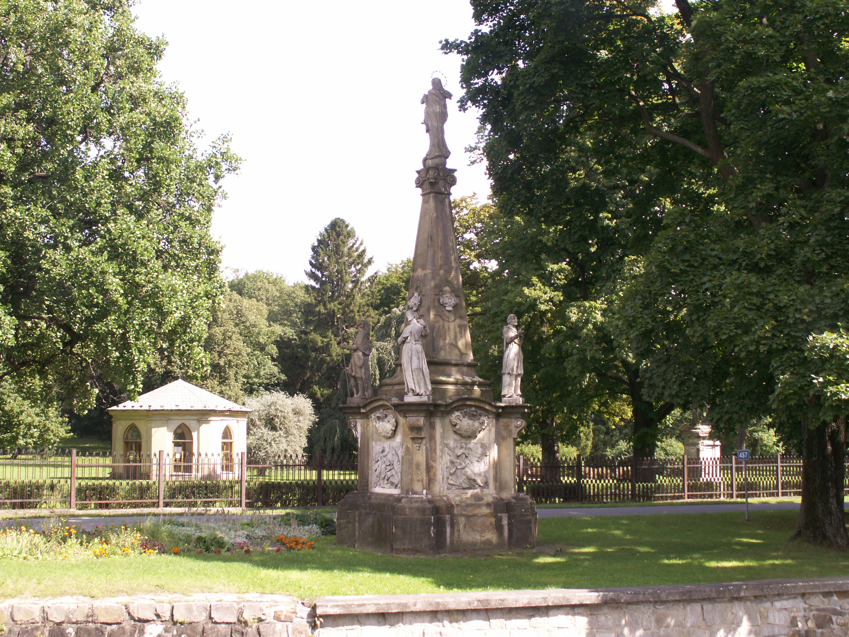 Jindřichov (okres Bruntál), sloup se sousoším Panny Marie